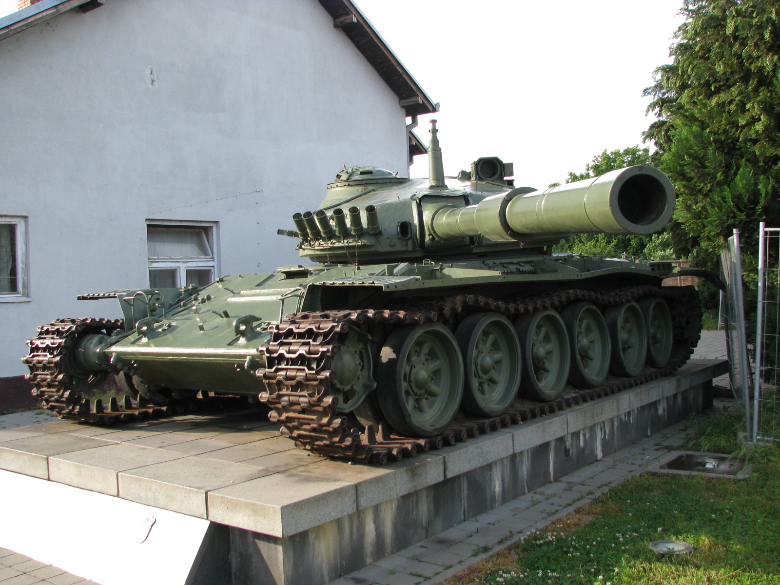 "Groblje tenkova" na Trpinjskoj cesti Template:"Tank graveyard" on Trpinja road